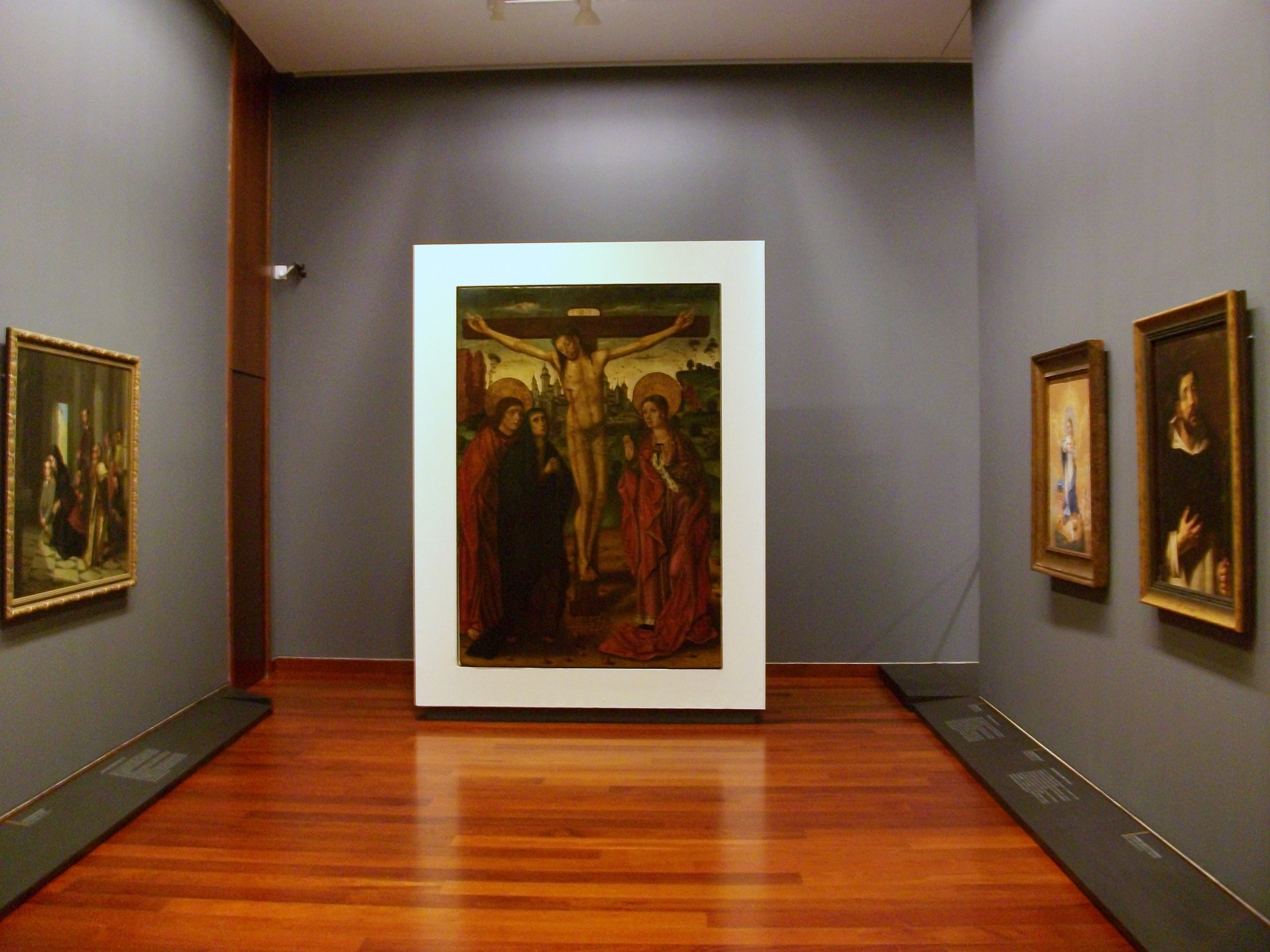 Interior del Museu de Belles Arts Gravina d'Alacant.